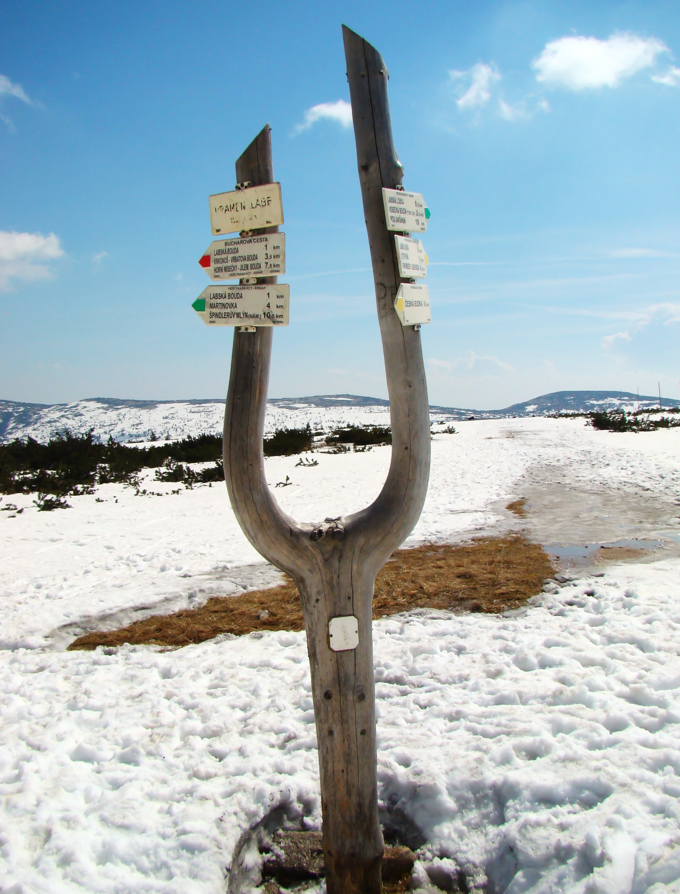 Labská louka, Krkonoše, Česko